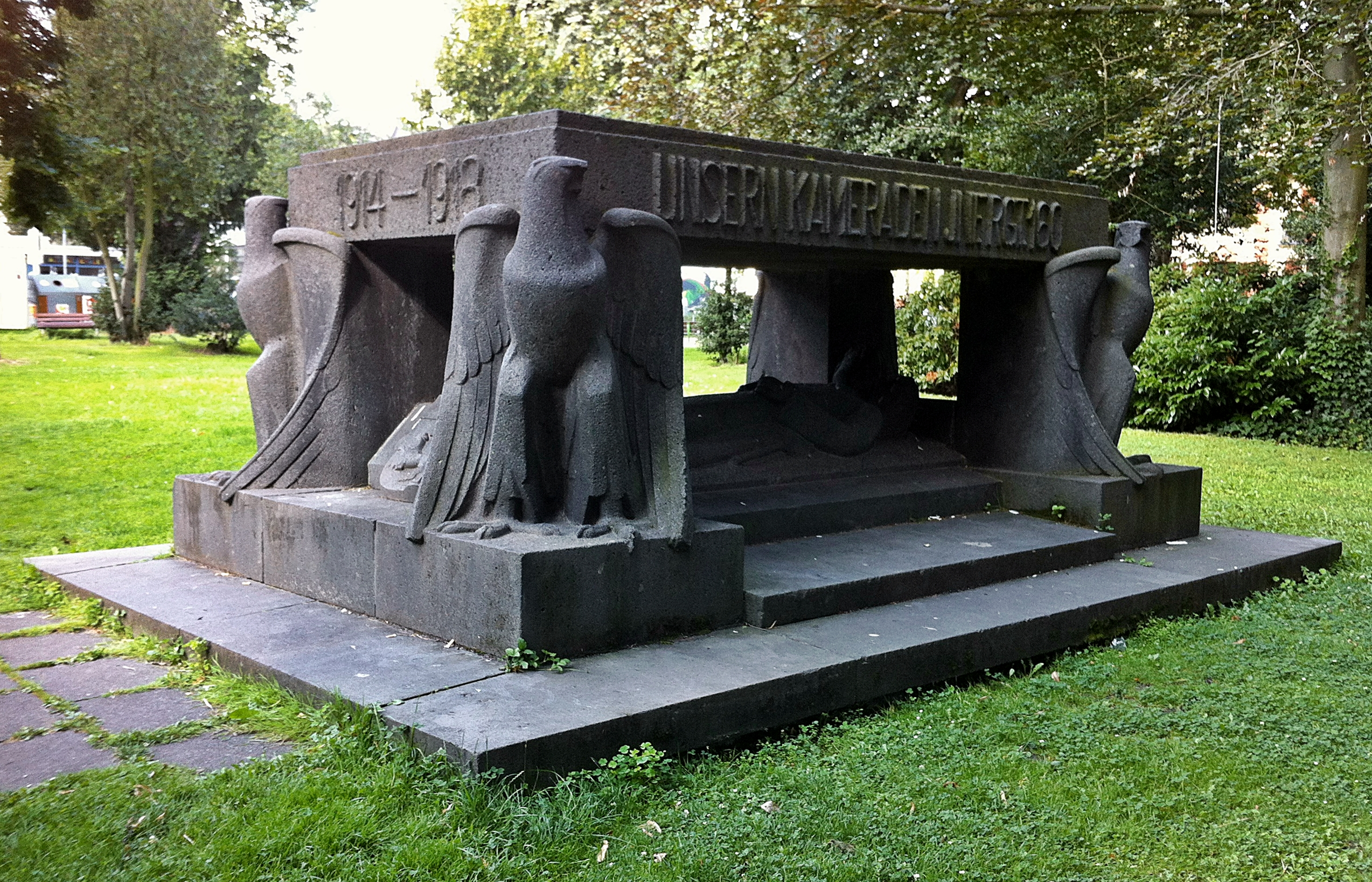 Deutschland, NRW, Bonn, Ortsteil Weststadt, Baumschulwäldchen (nahe Beethovenplatz): Gedenkstätte für die Bonner Gefallenen des Rheinischen Infanterie-Regiments Nr. 160 im 1. Weltkrieg